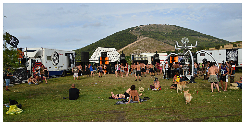 free party italy